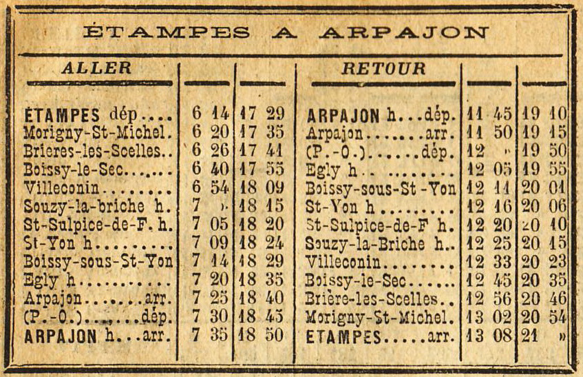 Indicateur des Chemins de fer - PLM-Orléans-Ceinture et Tramways de la région, offert par la Société Générale Imprimé à Corbeil Page 13 : Etampes à Arpajon (CGB